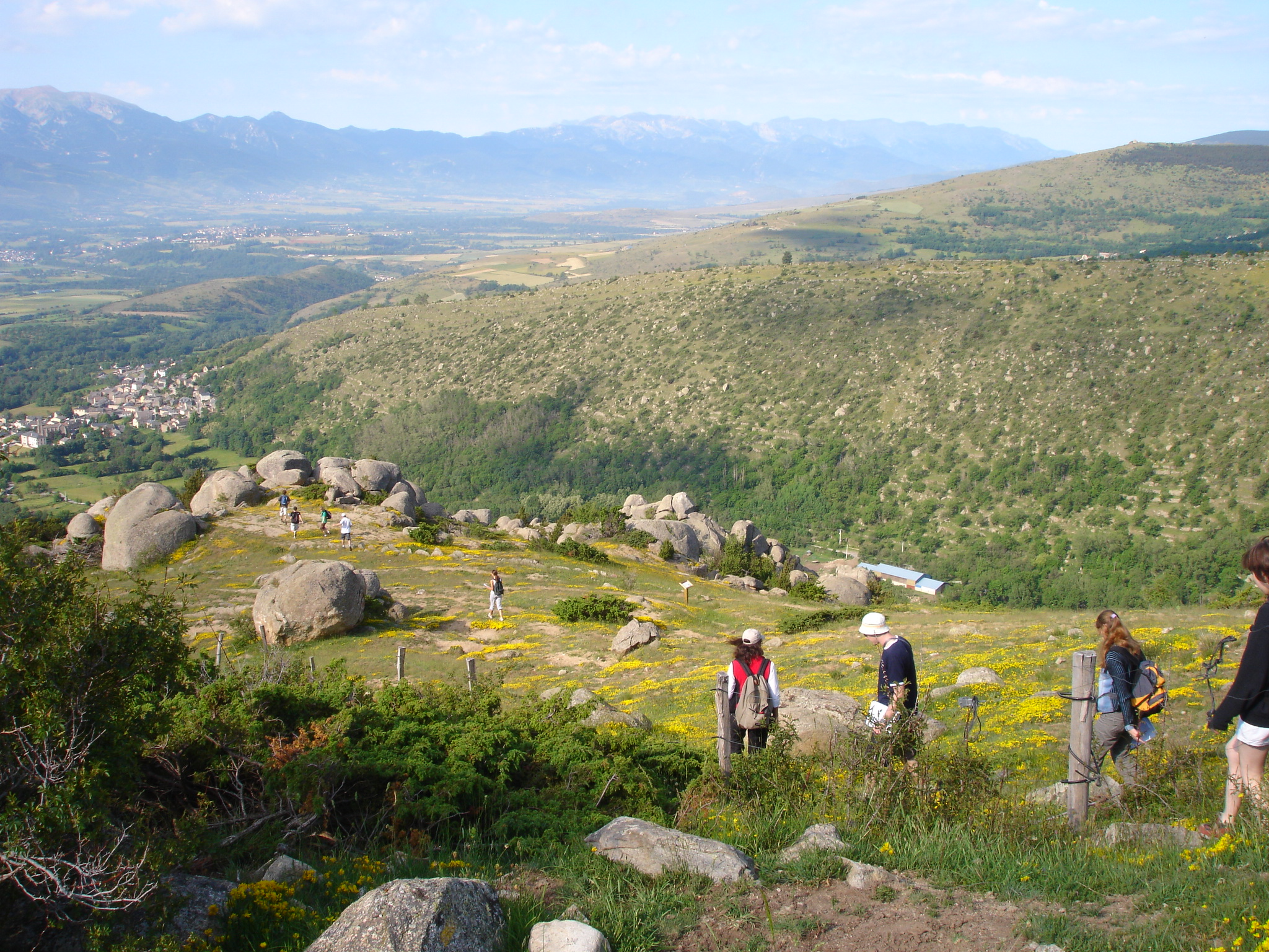 France, Pyrénées-Orientales (66), chaos de Targassonne près de Font-Romeu-Odeillo-Via - chaos granitique